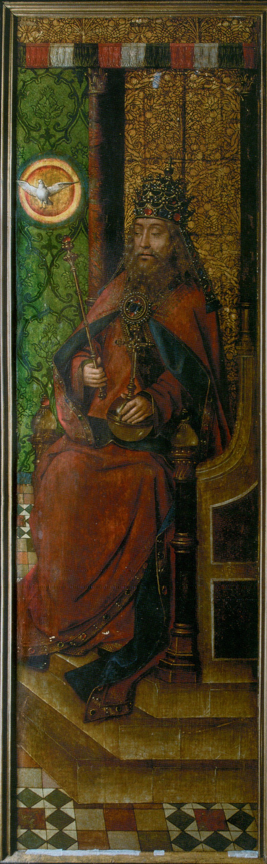 Estonian: „Michel Sittow (?), Mustpeade vennaskonna Maarja altar,Jumal-Isa, Niguliste kirik“title QS:P1476,et:"Michel Sittow (?), Mustpeade vennaskonna Maarja altar,Jumal-Isa, Niguliste kirik" label QS:Let,"Michel Sittow (?), Mustpeade vennaskonna Maarja altar,Jumal-Isa, Niguliste kirik"